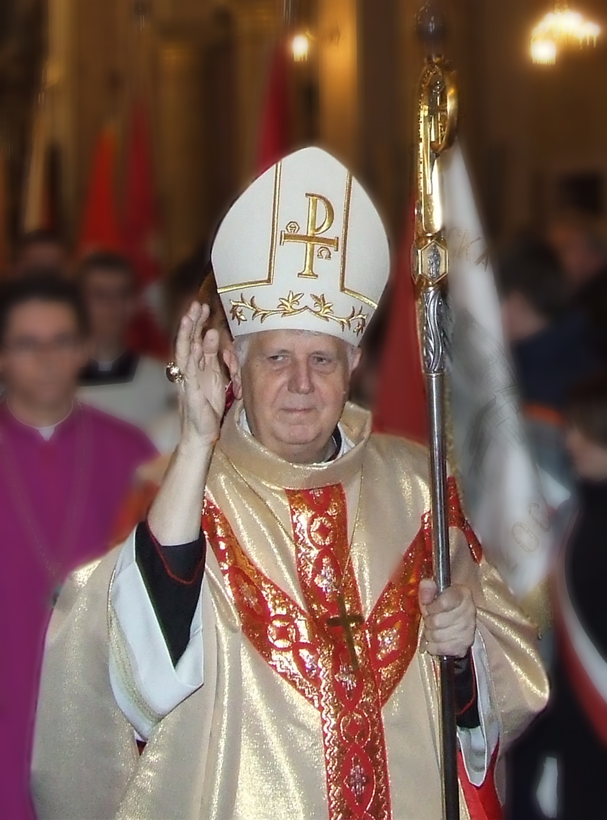 bp Stanisław Wielgus po Uroczystej Mszy Świętej 11 listopada 2006 r.